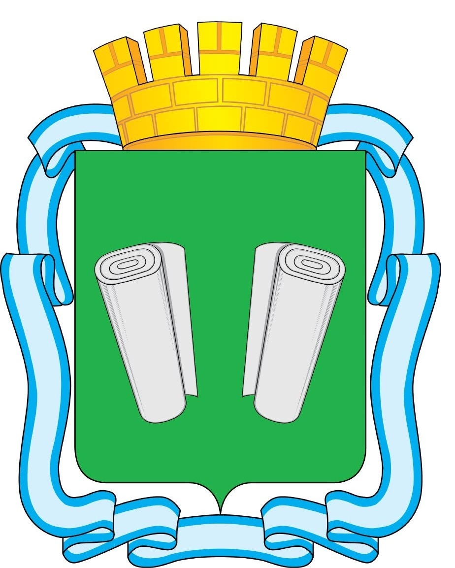 Герб города Кинешма (Ивановская область)